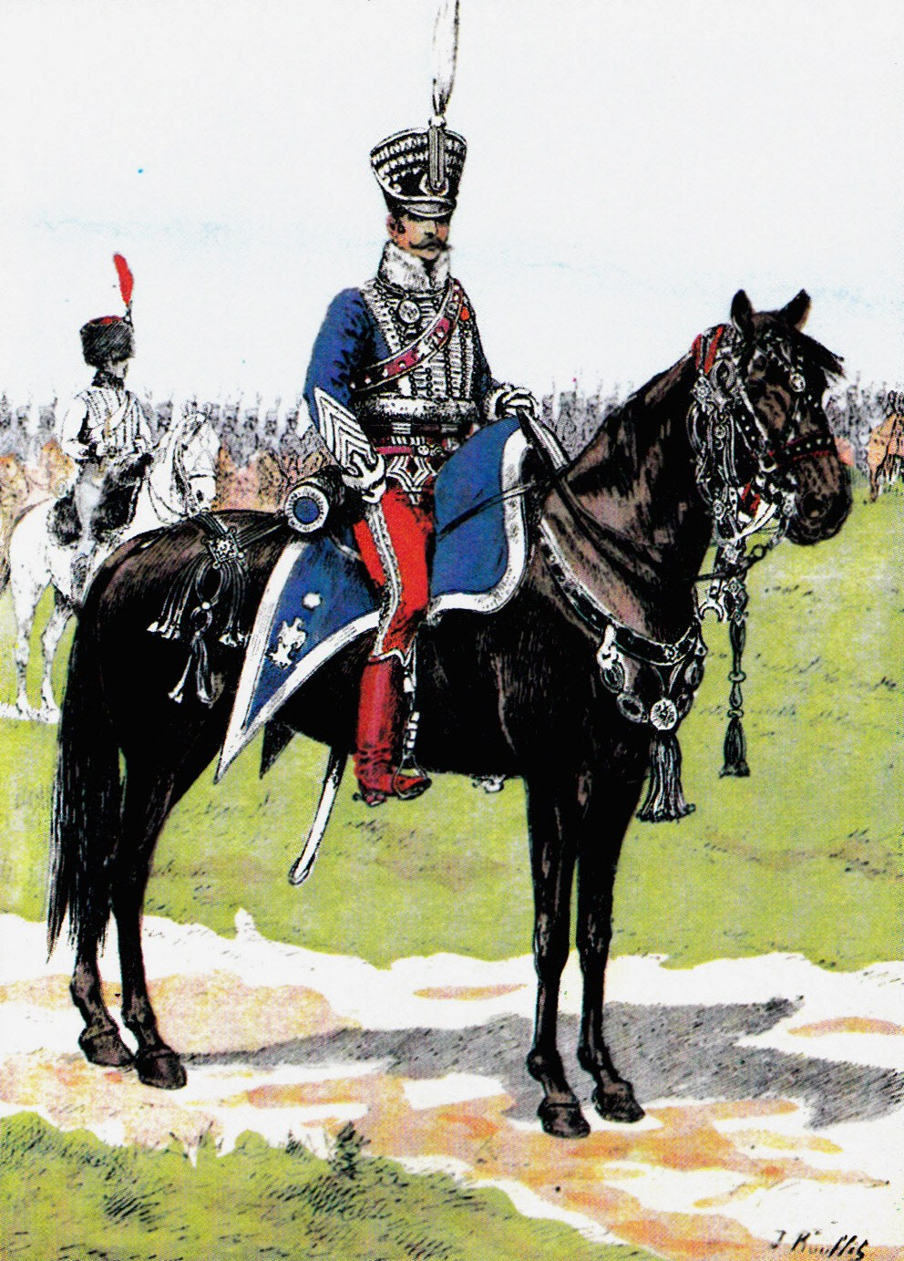 Colonel du 1er régiment de hussards, vers 1810. Reconstitution d'après des documents divers, parue dans la revue « La Giberne » et reproduite dans l'historique du régiment.